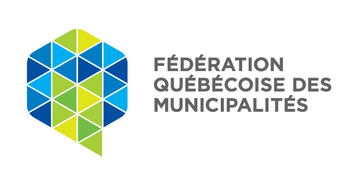 Identité visuelle de la Fédération québécoise des municipalités